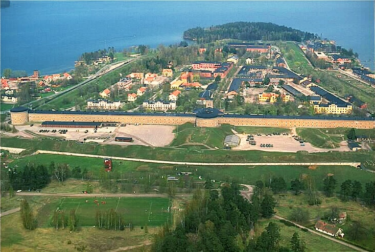 Karlsborgs fästning i Karlsborg i Västra Götalands län i Sverige. Närmast i bild är slutvärnet med garnisonskyrkan i mitten. Framför slutvärnet ligger stabsplan. Bakom slutvärnet ligger de tre byggnaderna Västra, Mellersta och Östra Befäl. Längst ut på Vanäsudden ligger det gamla garnisonssjukhuset.